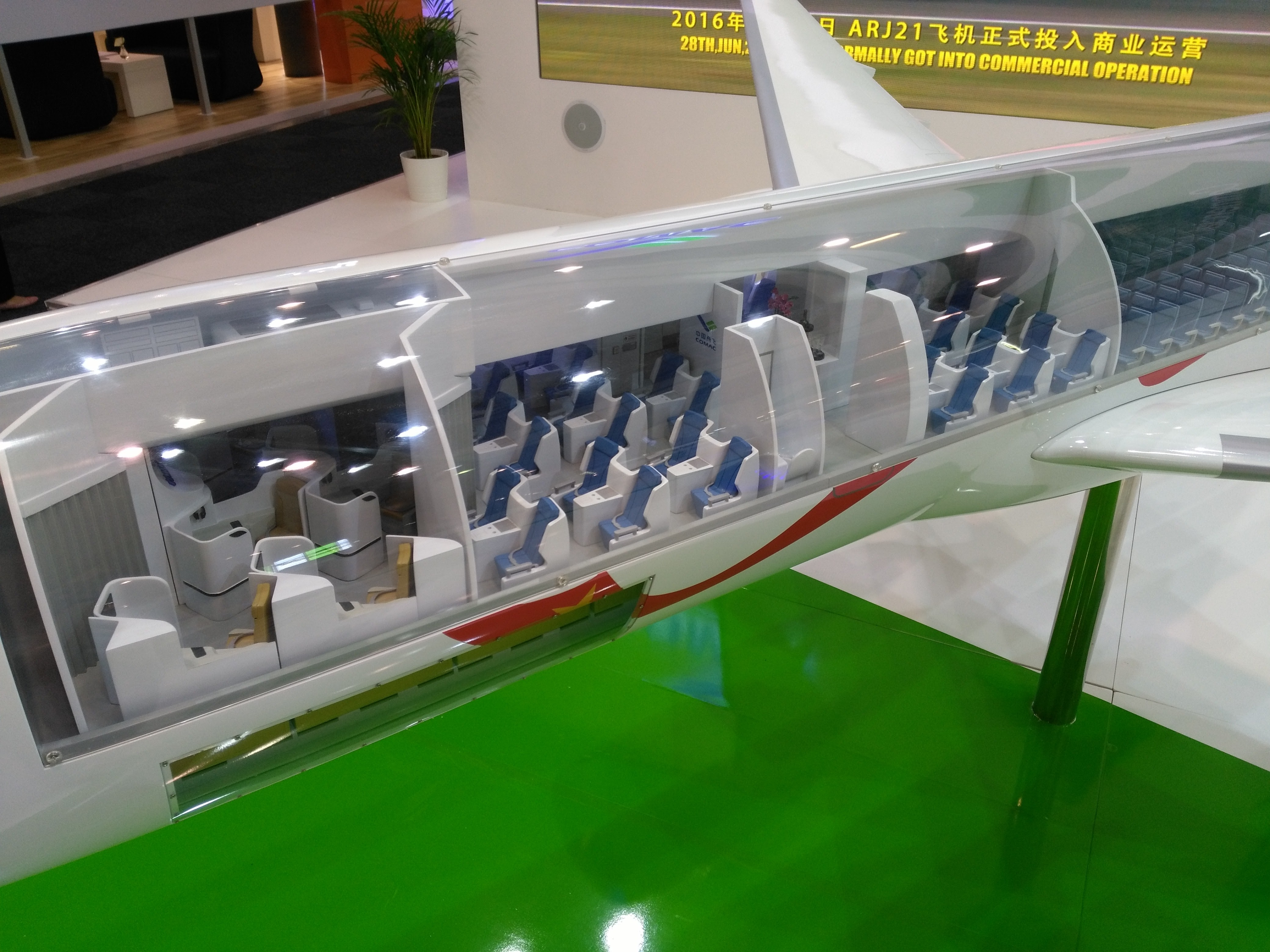 Paris Air Show 2017 Comac C929